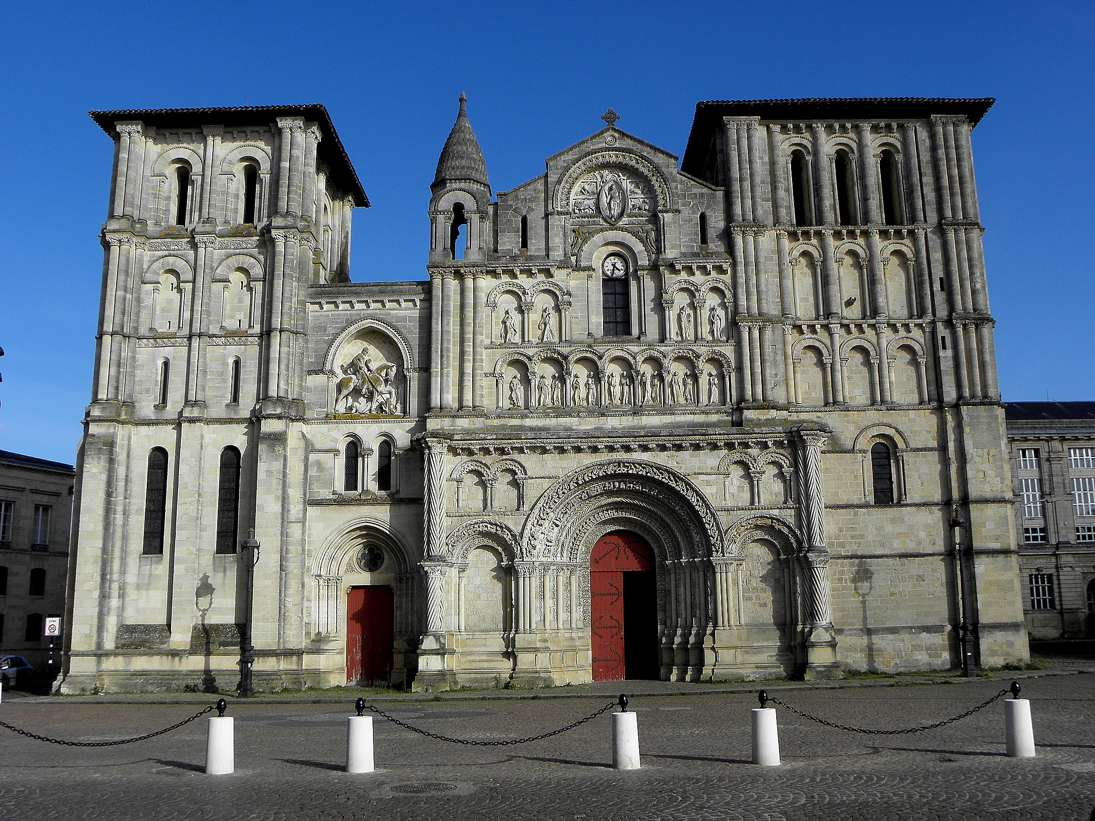 Façade occidentale de l'église Sainte-Croix de Bordeaux (33).